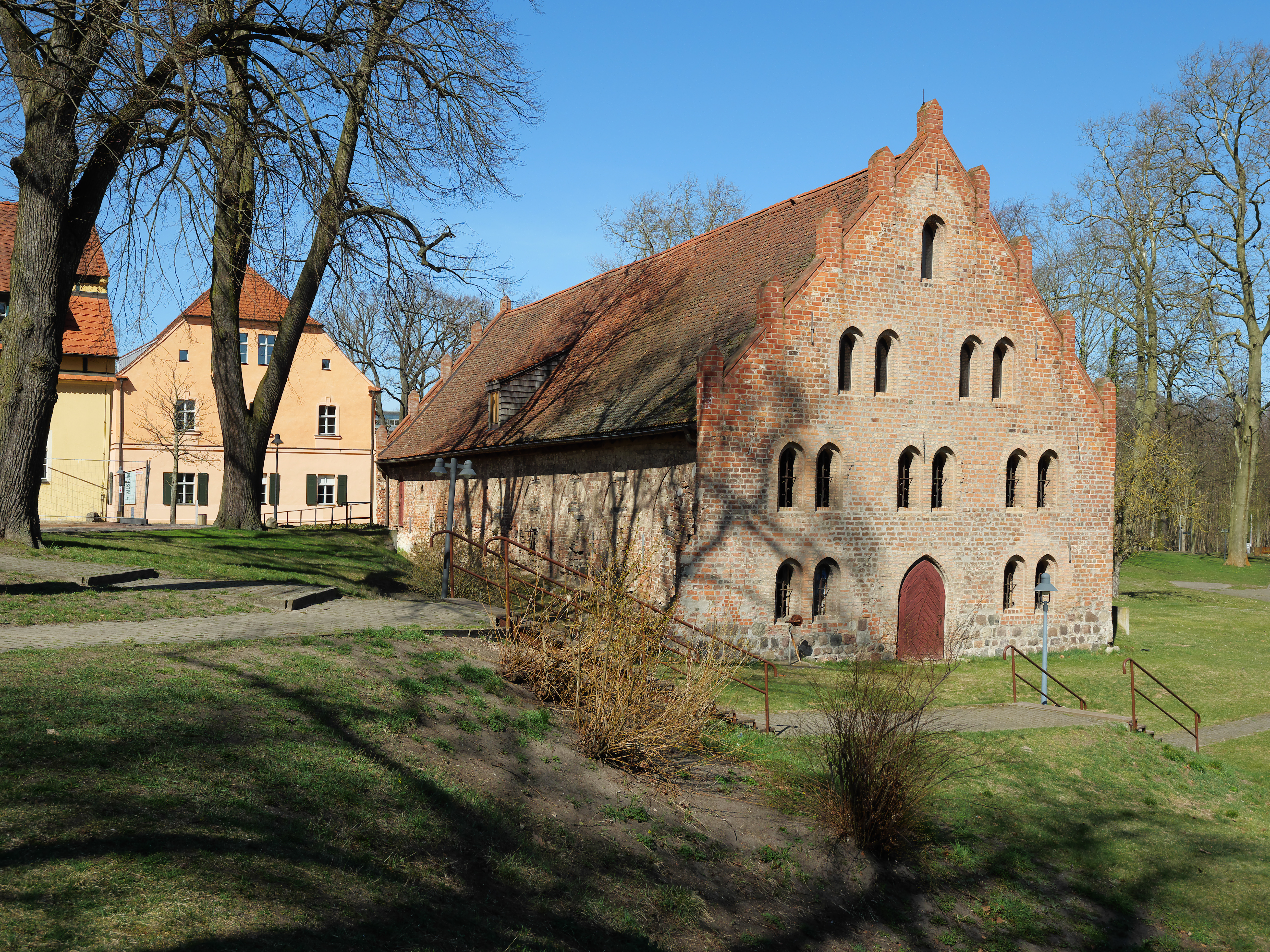 Kloster Lehnin, Kornspeichergebäude